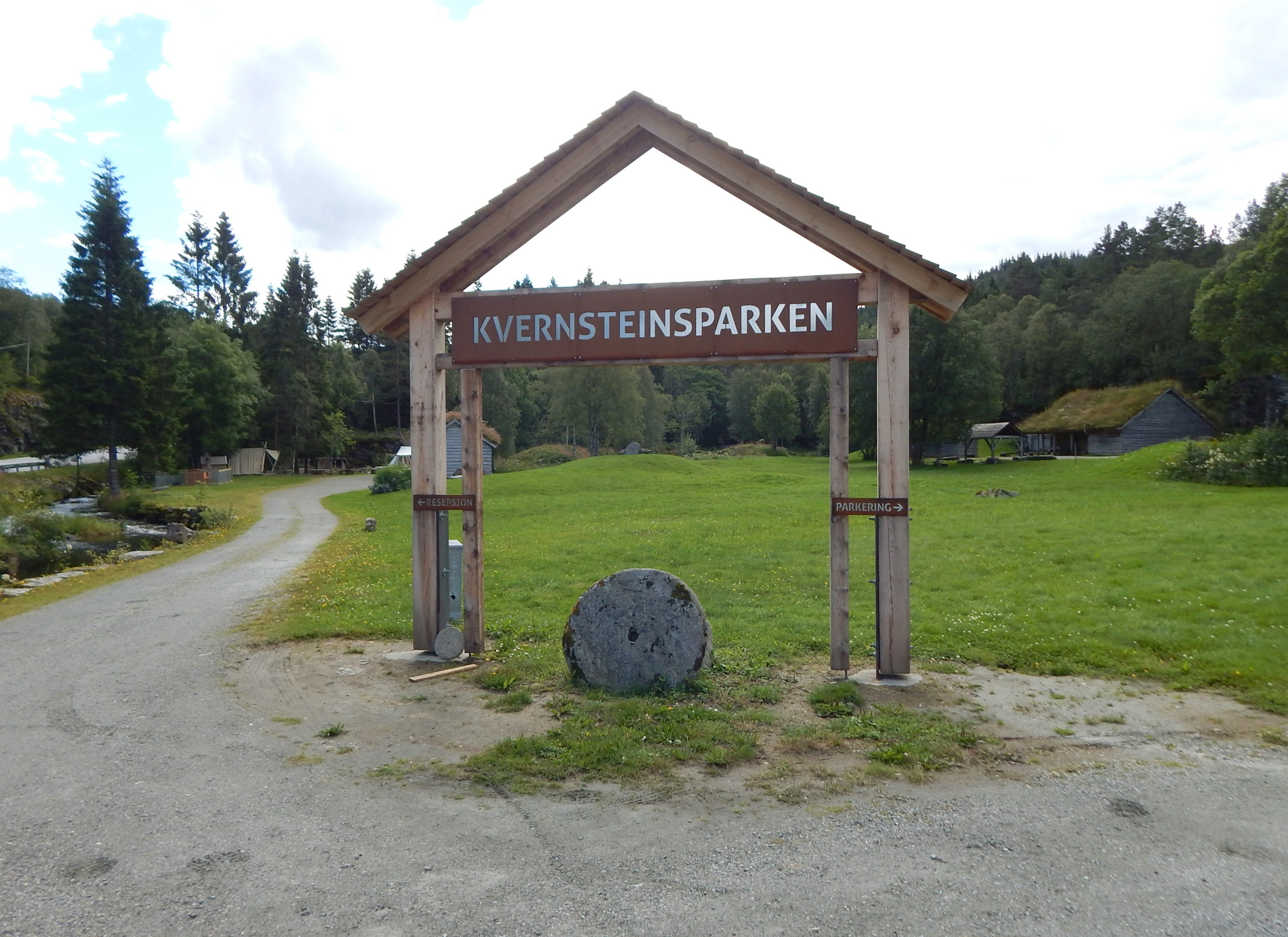 Kvernsteinsparken i Hyllestad